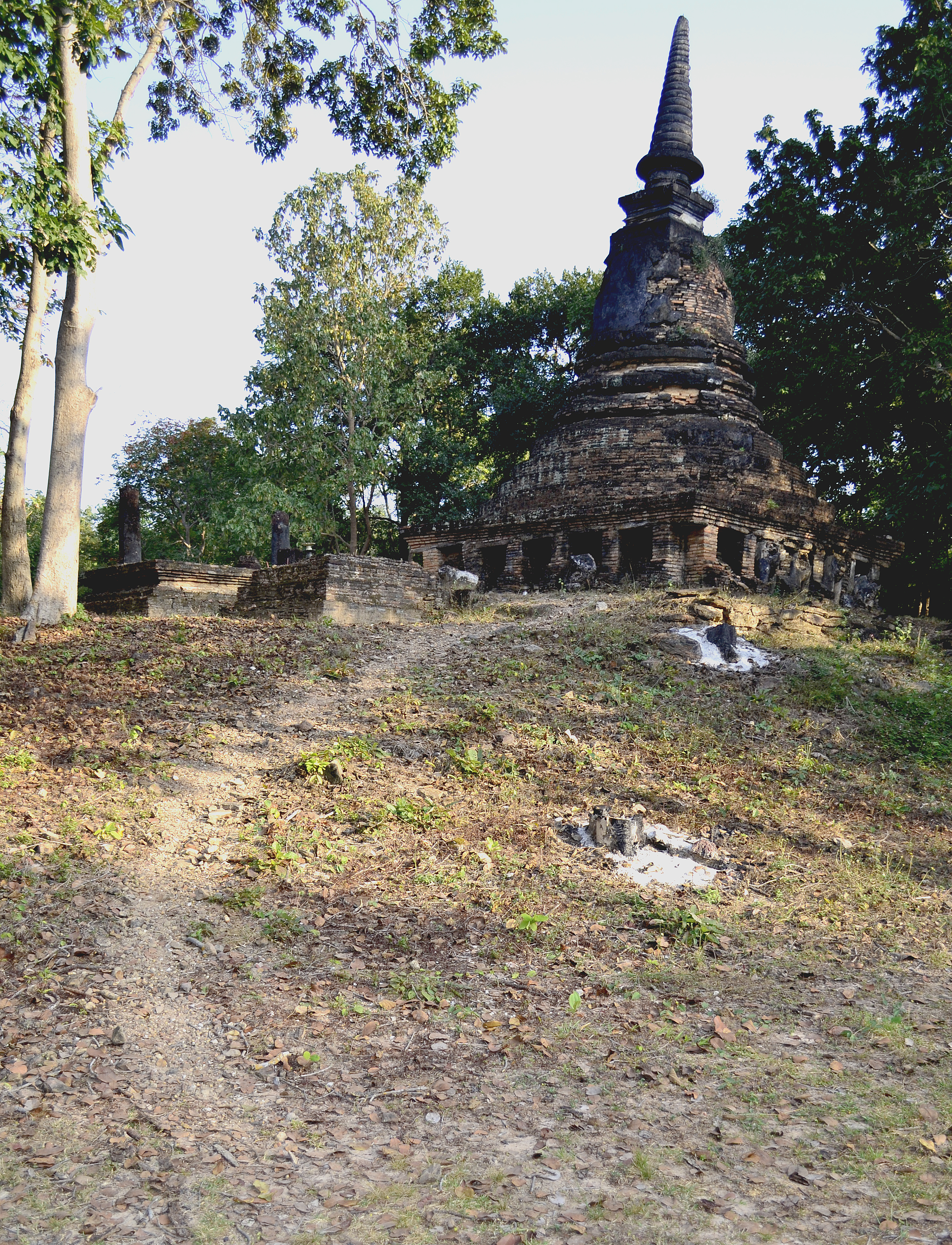 Wat Chang Rob im Geschichtspark Sukhothai